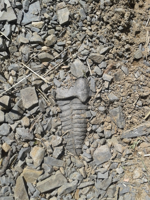 Naučná stezka Po stopách trilobita. Co lze najít na cestě.